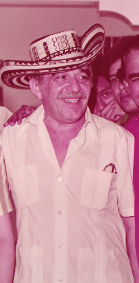 Picture of Gabriel Garcia Marquez